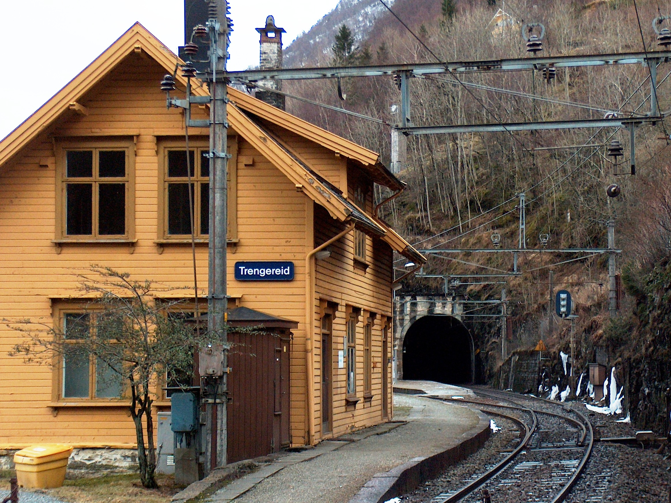 Trengereid stasjon nær